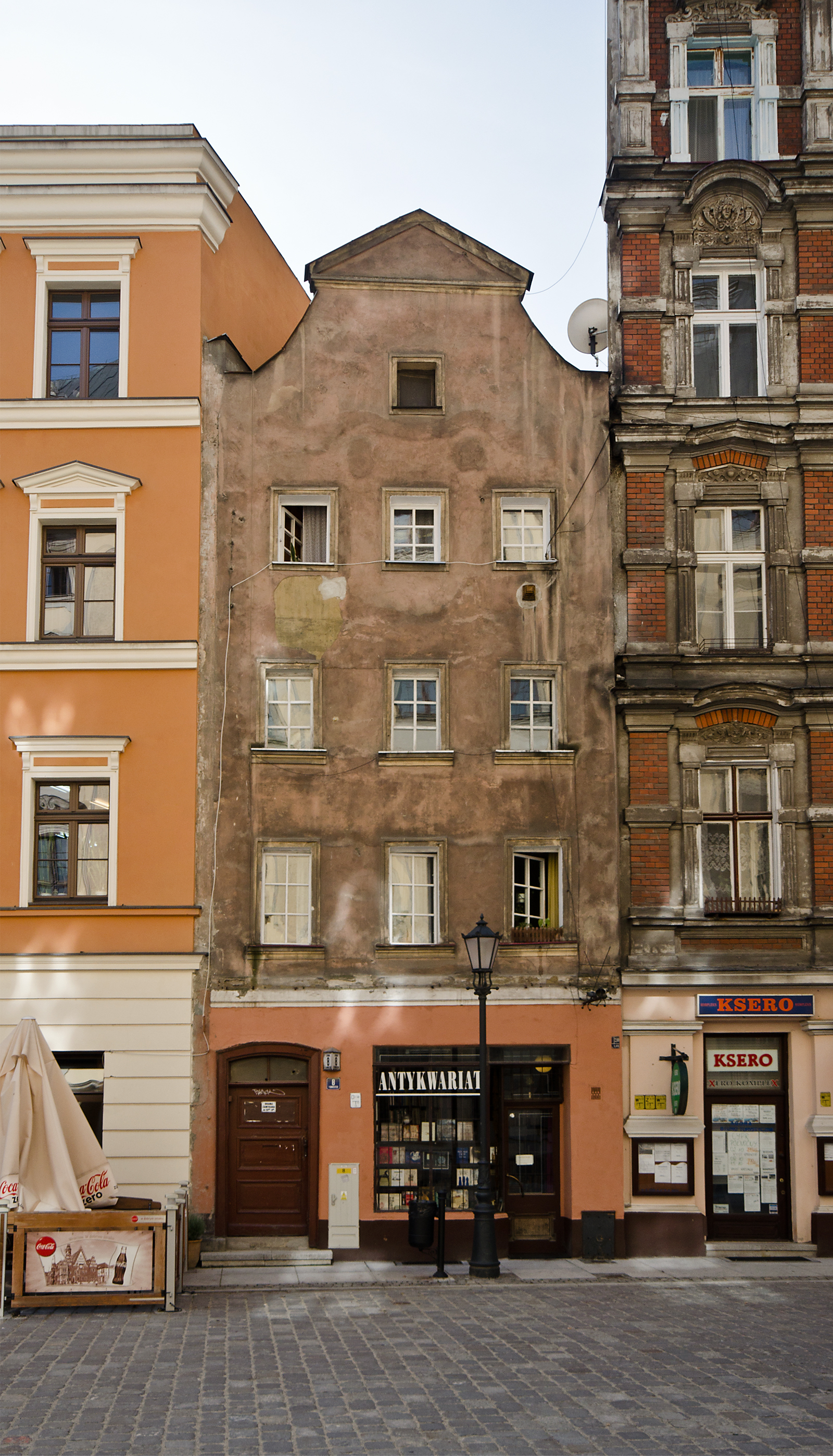 Kamienice pl. Uniwersytecki 8, Miasto Wrocław - Stare Miasto